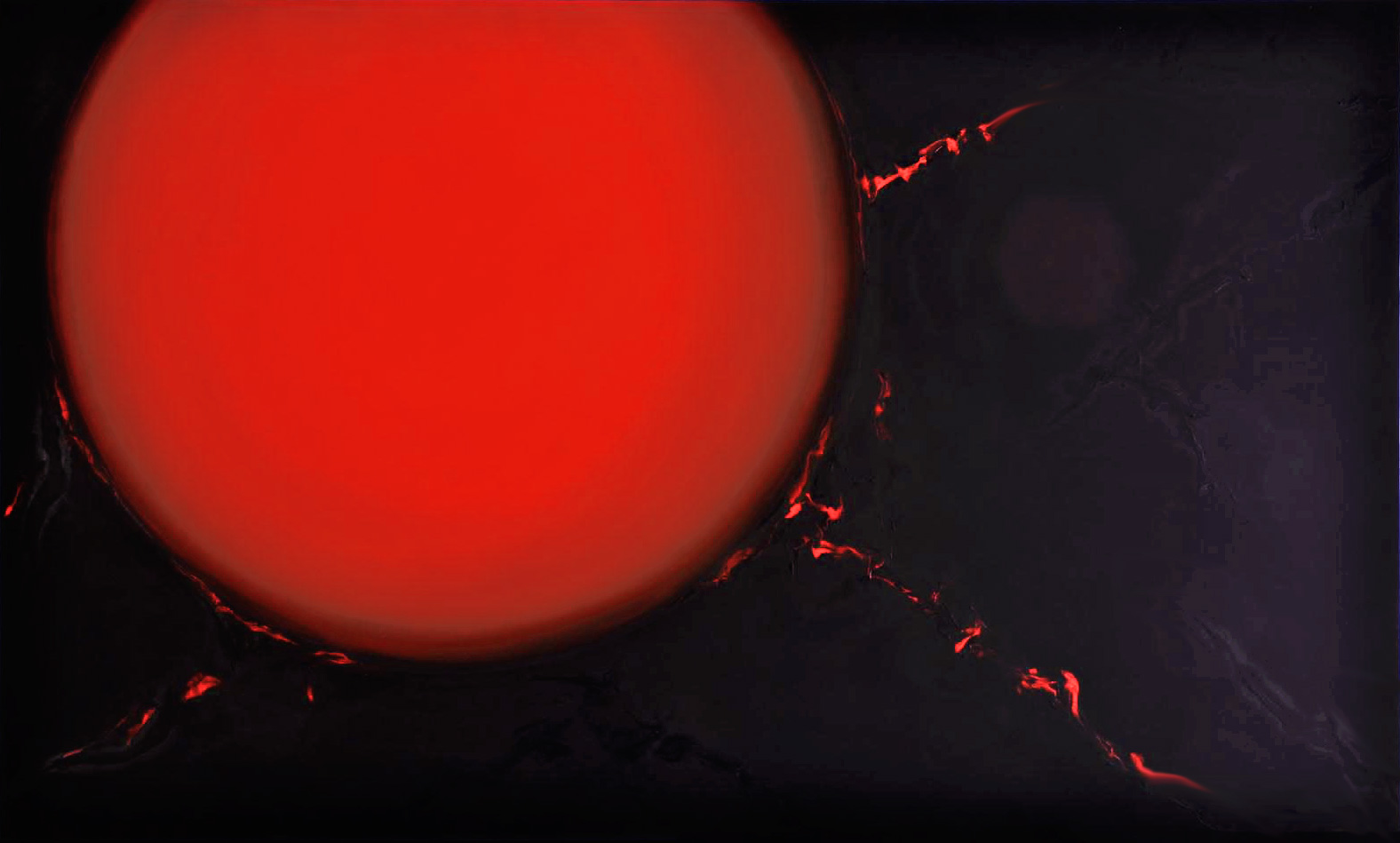 Reprodução do quadro de minha propriedade